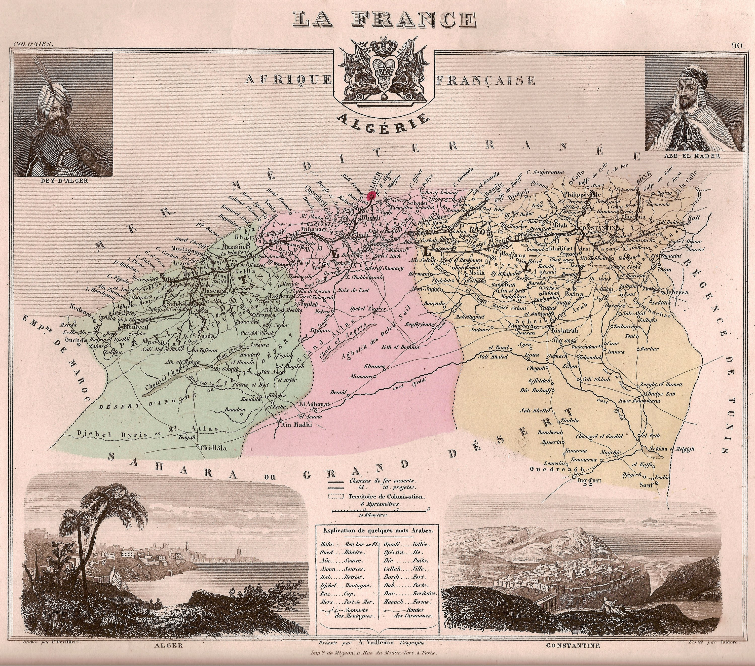 Title : Afrique française - Algérie / Former french provinces of Algeria Description : Alexandre Vuillemin, géographe , 1877 (?) . La carte donne les trois provinces d'Alger, Oran et Constantine, ce qui correspond à la situation administrative antérieure à 1870, et le tracé d'un réseau de chemin de fer la situe après 1856.